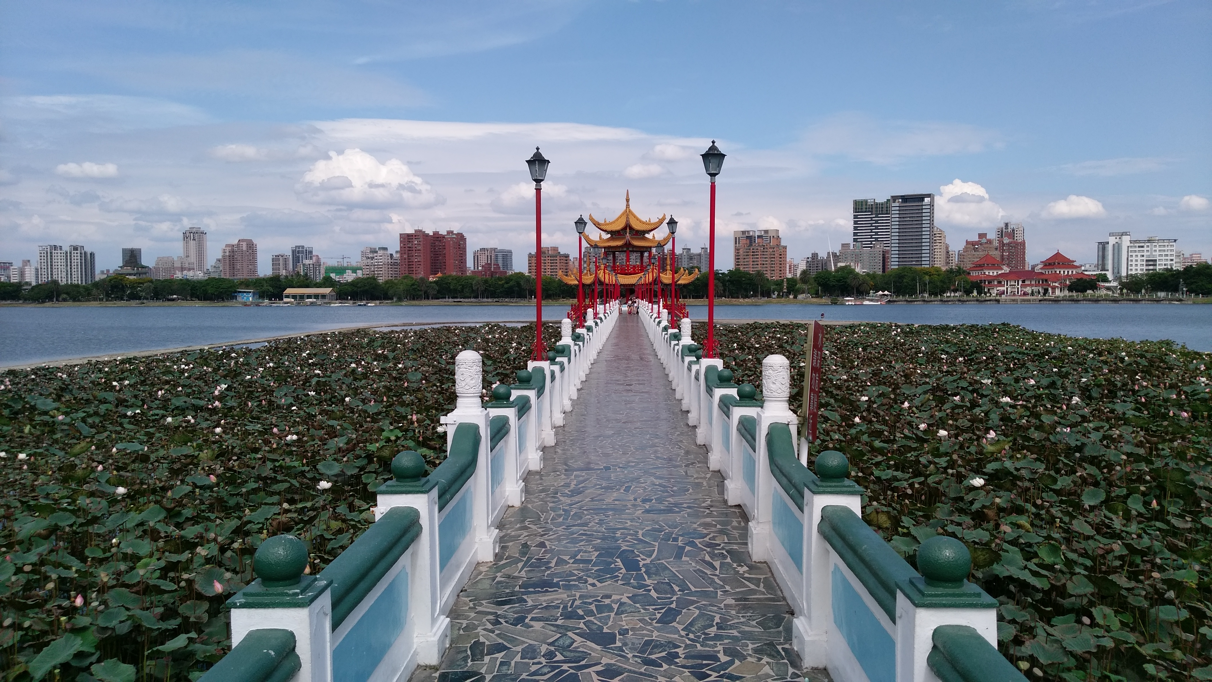 中文（台灣）: 蓮池潭五里亭